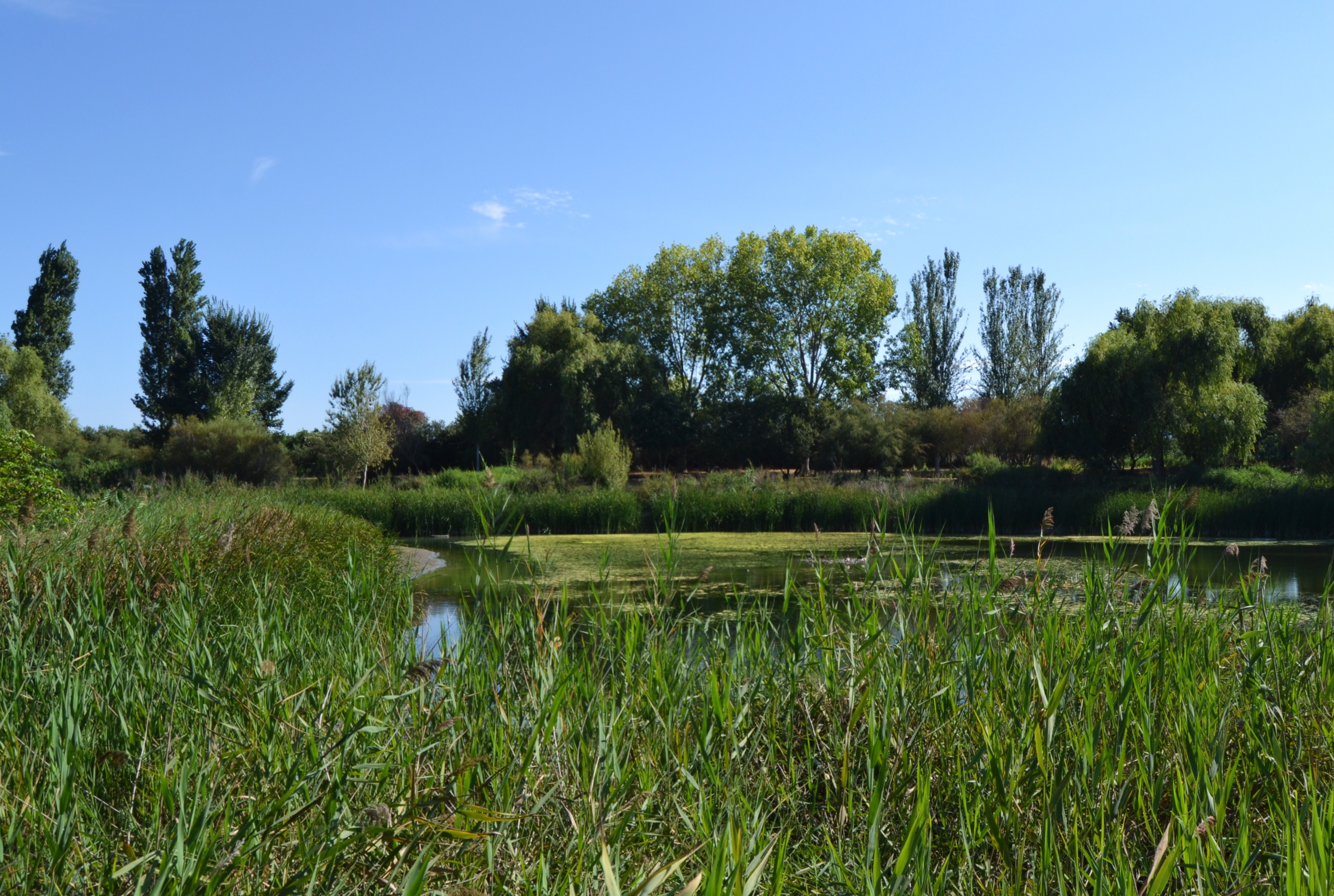 Canyís a l'ullal de l'Estany, Gandia.